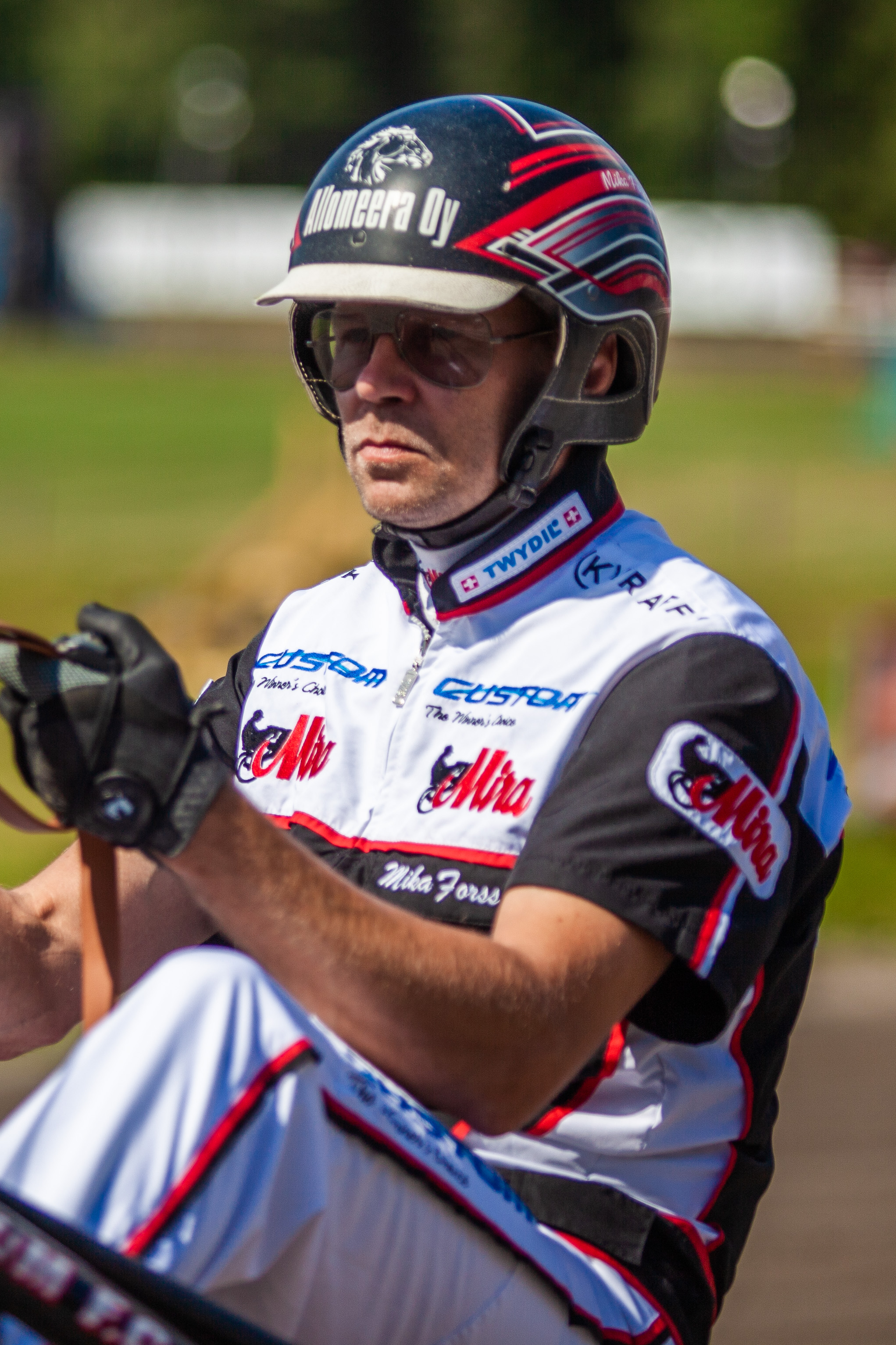 Mika Forss at Mikkeli 21.7.2019